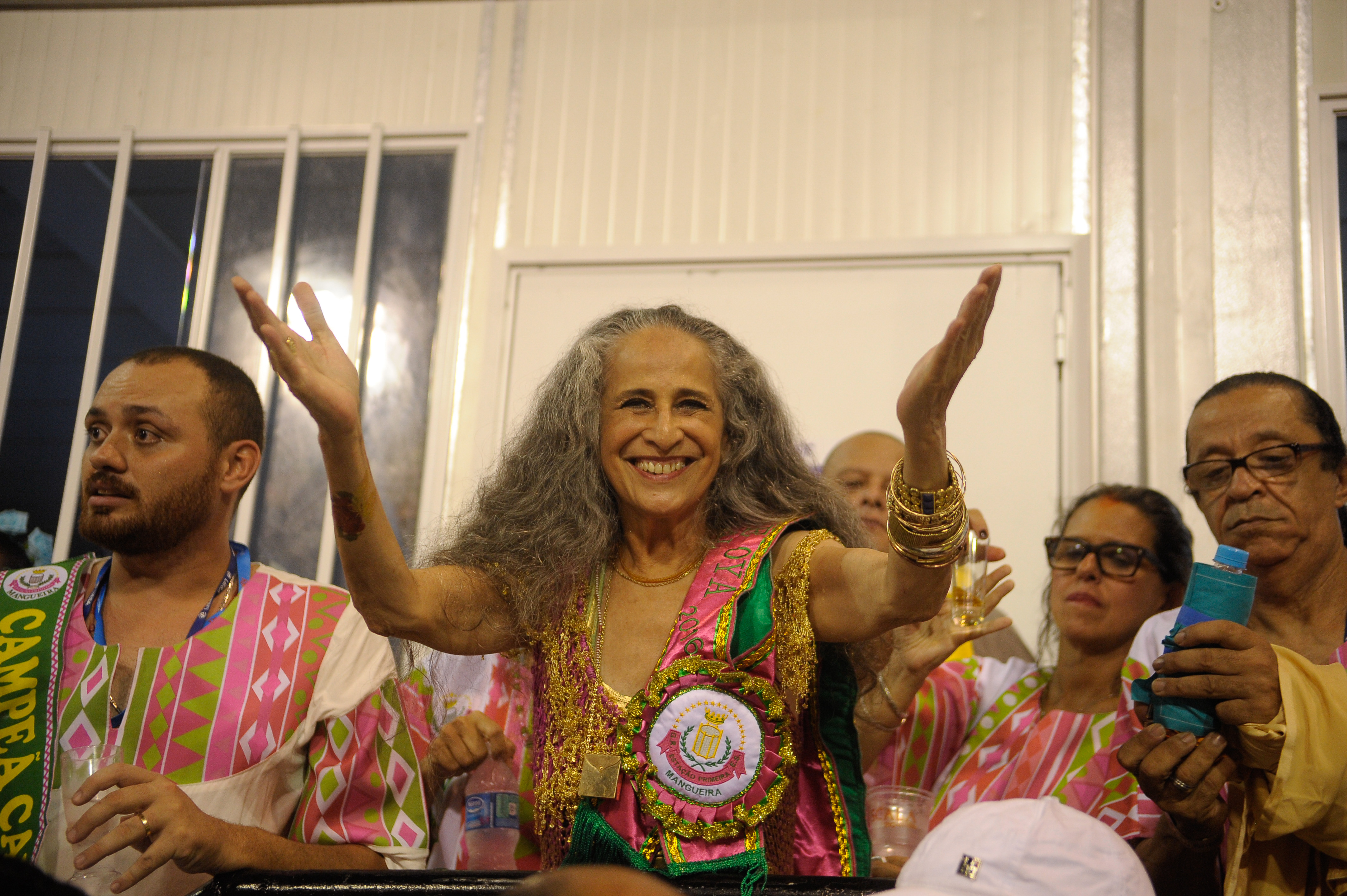 Rio de Janeiro - Mangueira, a grande vitoriosa do carnaval foi a última escola a se apresentar na Marquês de Sapucaí, no desfile das campeãs, com o enredo sobre a Maria Bethânia (Tomaz Silva/Agência Brasil)